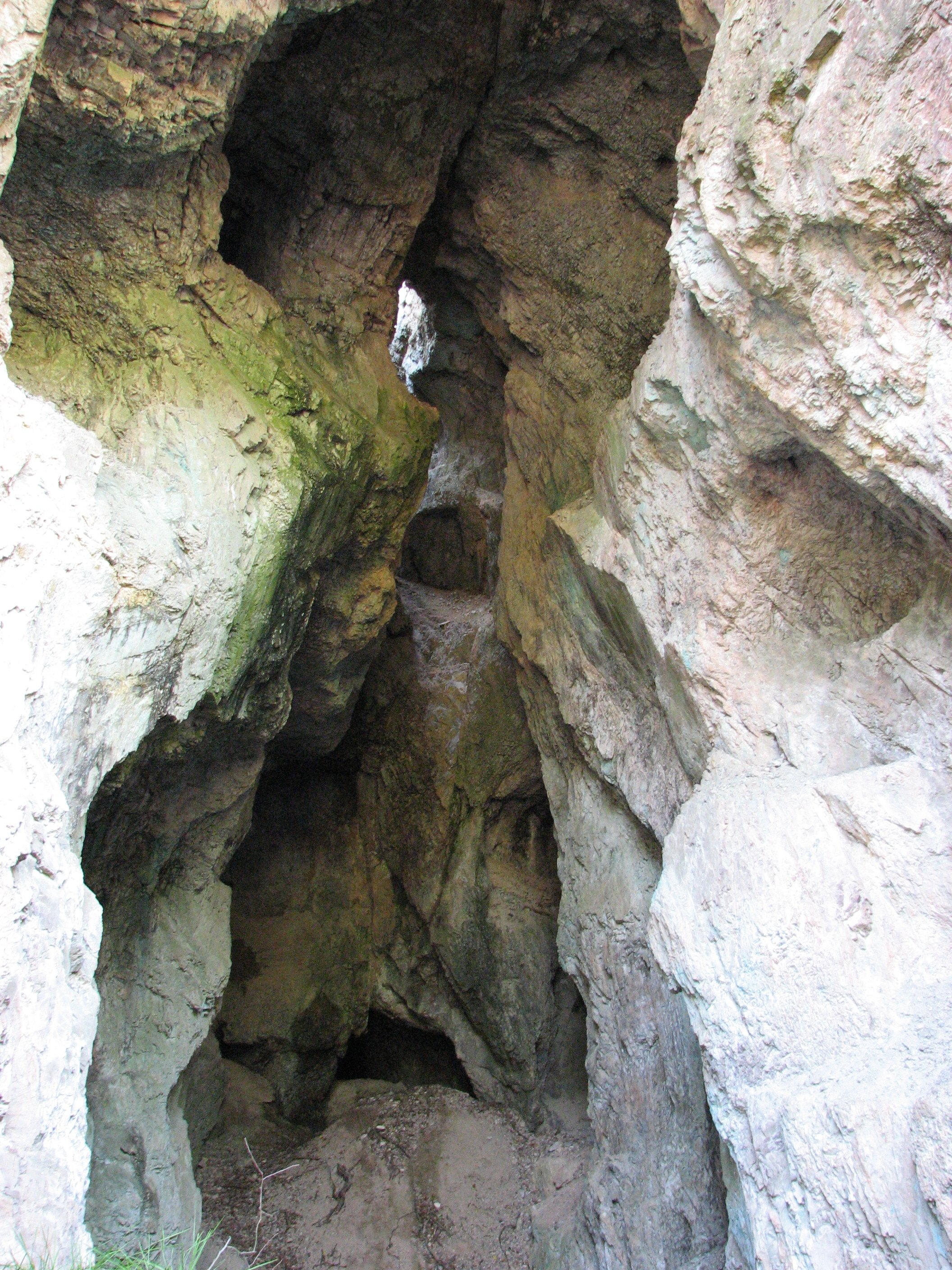 Weisse Grube Imsbach Verhau